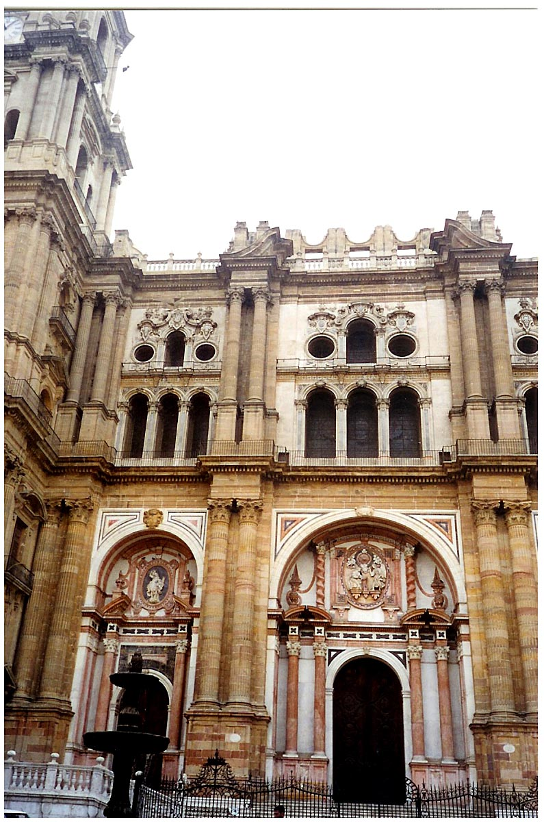 Santiago de Compostela.